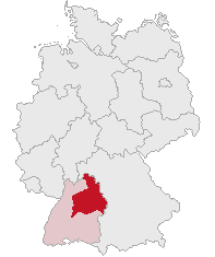 Regierungsbezirk Stuttgart, Baden-Württemberg, Germany